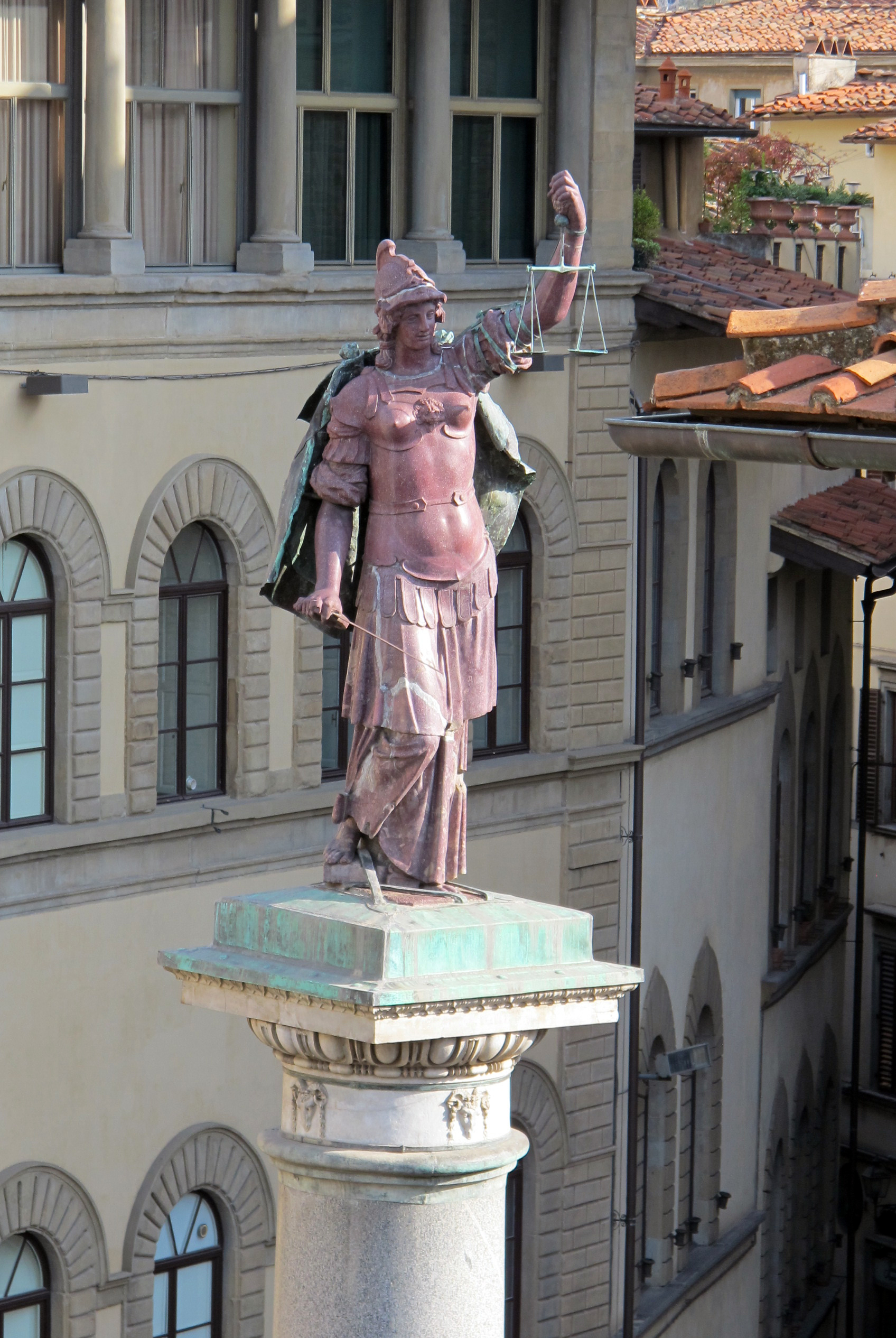 Hotel beacci tornabuoni, terrazza, vista colonna della giustizia